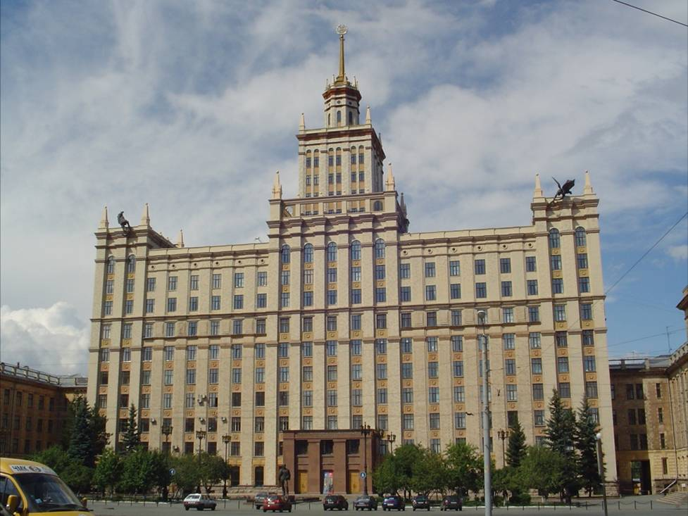 Hlavní budova Jihouralské státní univerzity